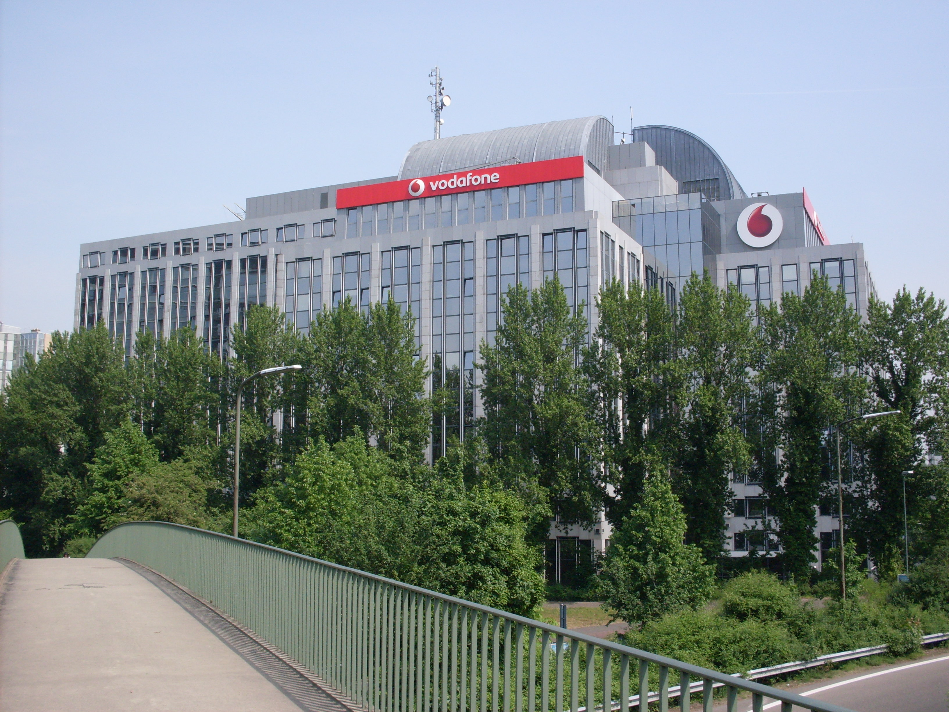 Düsseldorf-Lörick - ehemaliges Vodafone Bürohaus